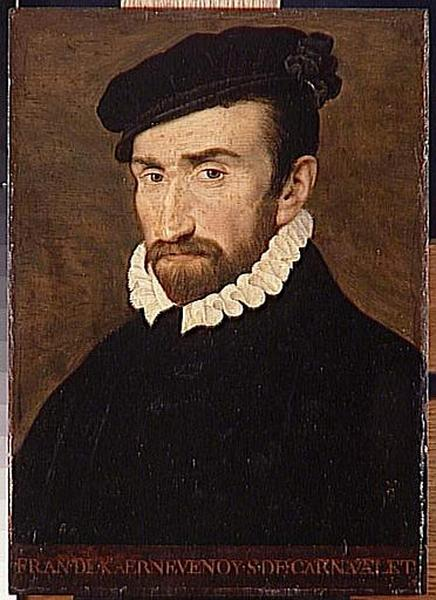 François de Kernevenoy, seigneur de Carnavalet (1520-1571)